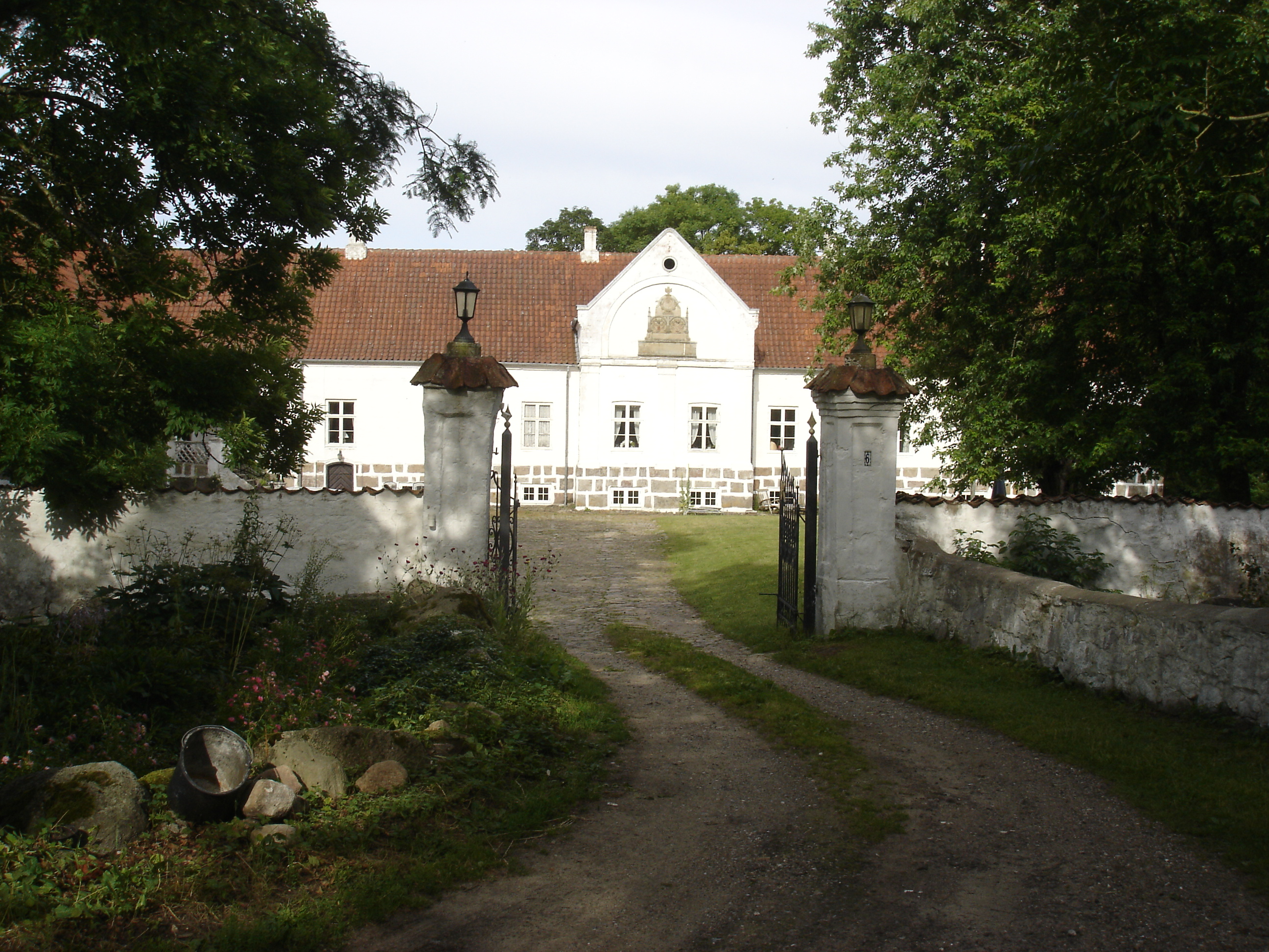 Waar Hovedgårds indkørsel fra V